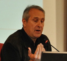 Salvador Alsius (Universidad Pompeu Fabra)